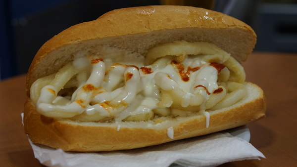 Genuino bocadillo zaragozano de calamares bravos